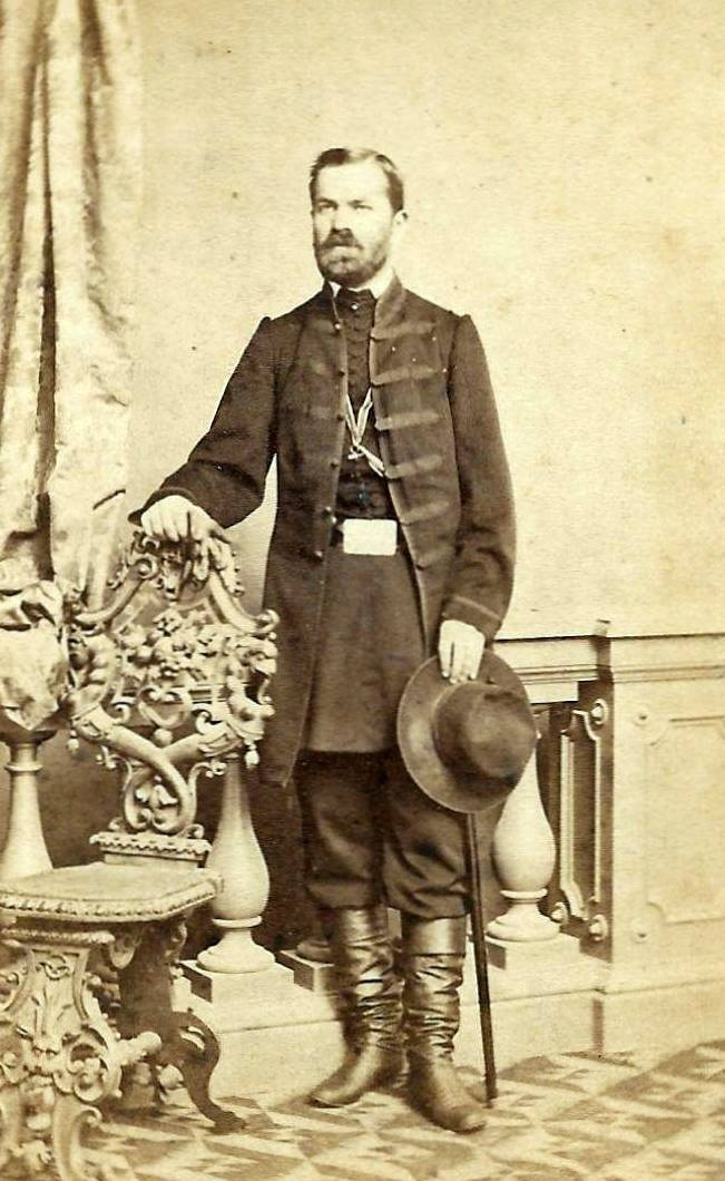 Mieczysław Antoni Dzieduszycki (1823-1872)